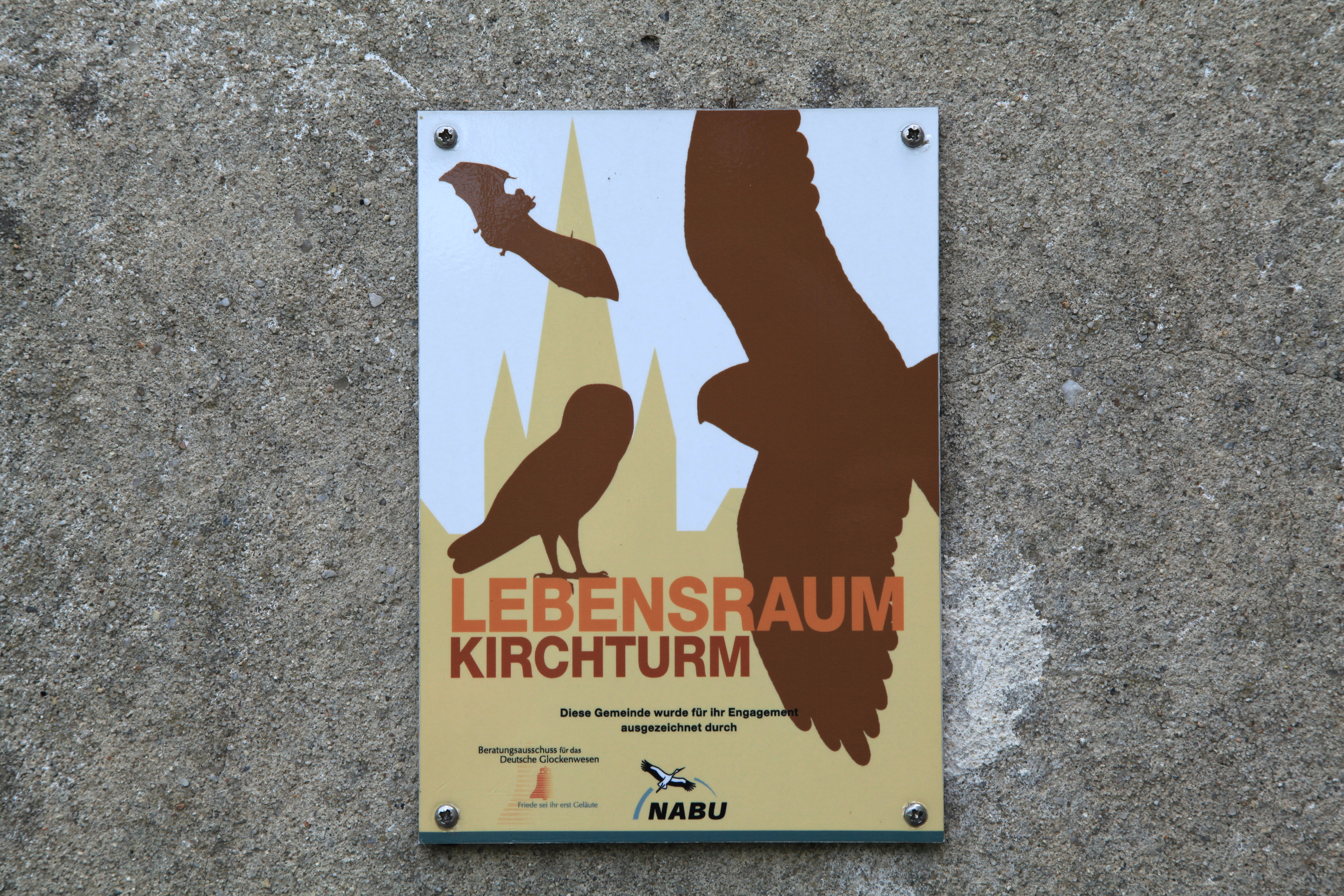 Kirche Kosel, Krebaer Straße in Kosel, Niesky